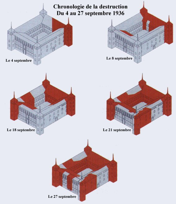 Schéma de la destruction de l'Alcazar de Tolède 1936